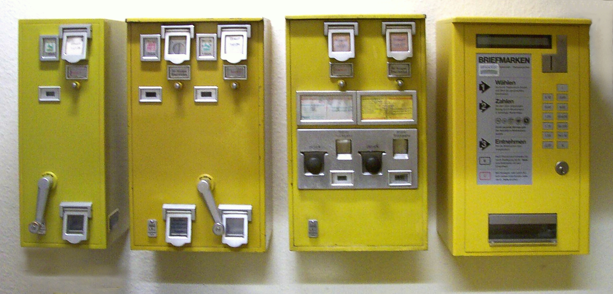 Vier verschiedene deutsche Briefmarkenautomaten im Postmuseum Rheinhessen